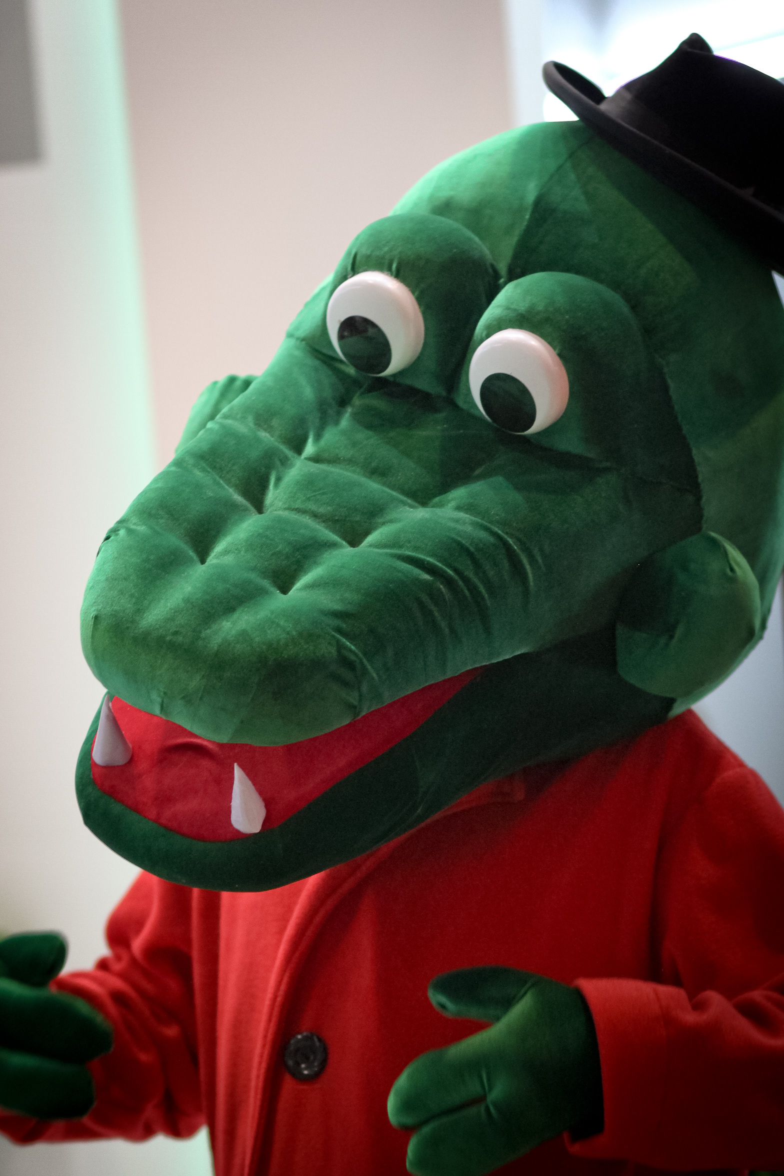 Крокодил Гена на ММКВЯ-2011